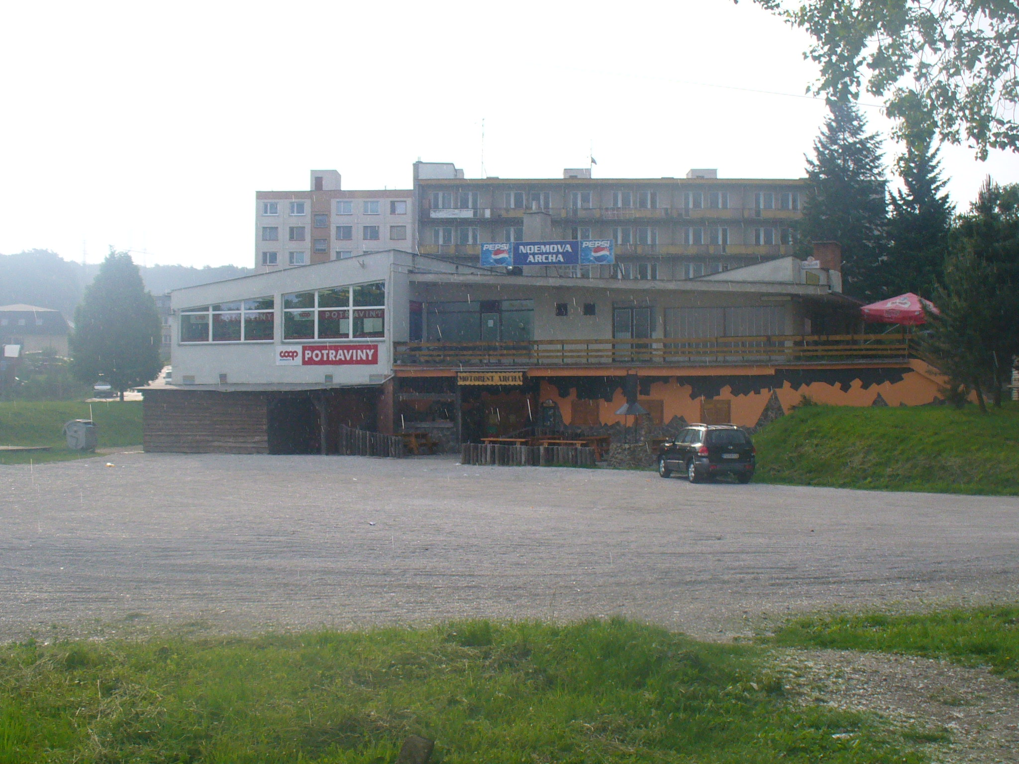 Pravenec.